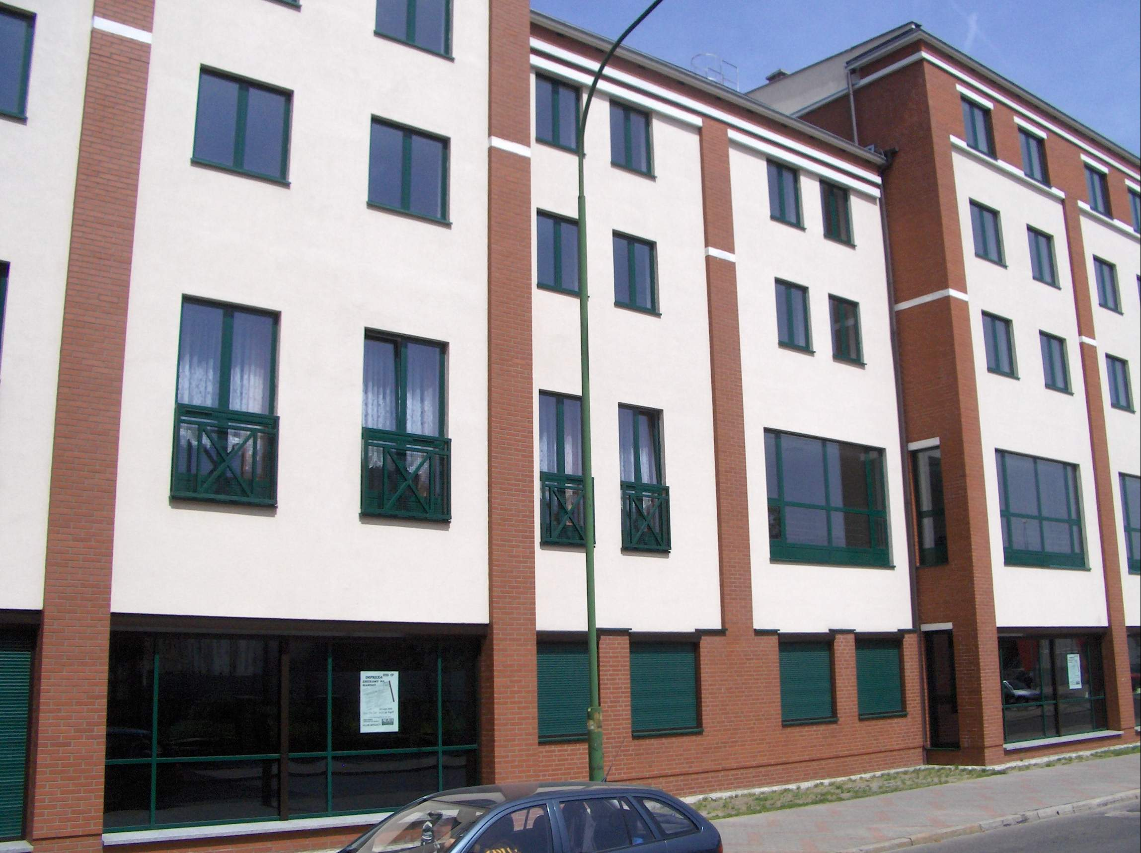 Dom Studencki "Forum", Klub Studencki Witkacy przy ul. Piłsudskiego 19 w Słubicach